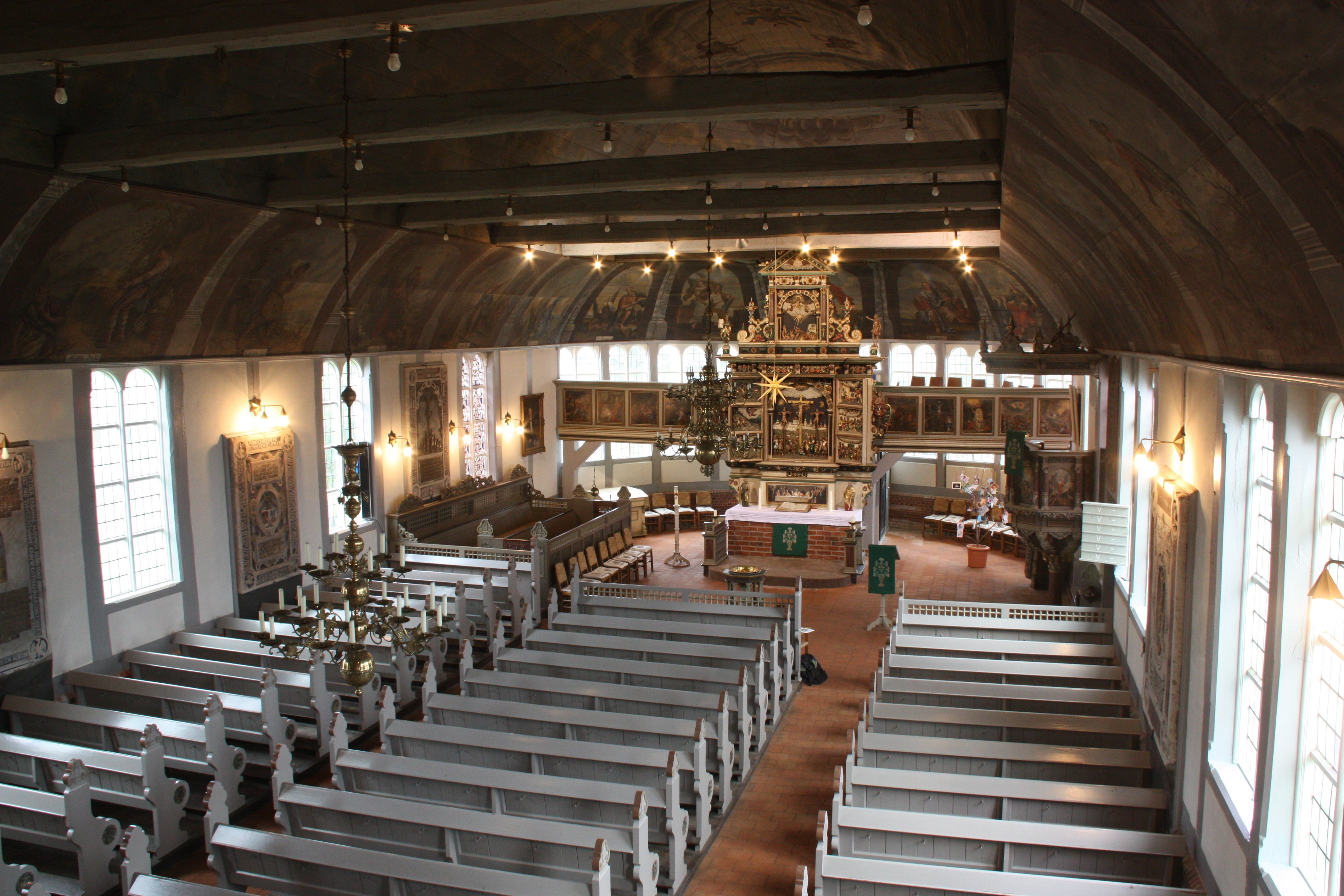 This is a photograph of an architectural monument. Hamburg, Allermöhe-Reitbrook, Dreieinigkeitskirche, Innenraum, Blick von der Orgelempore.